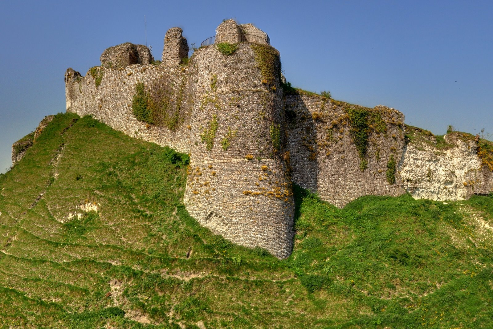 Rempart sud est du château d'Arques-la-Bataille